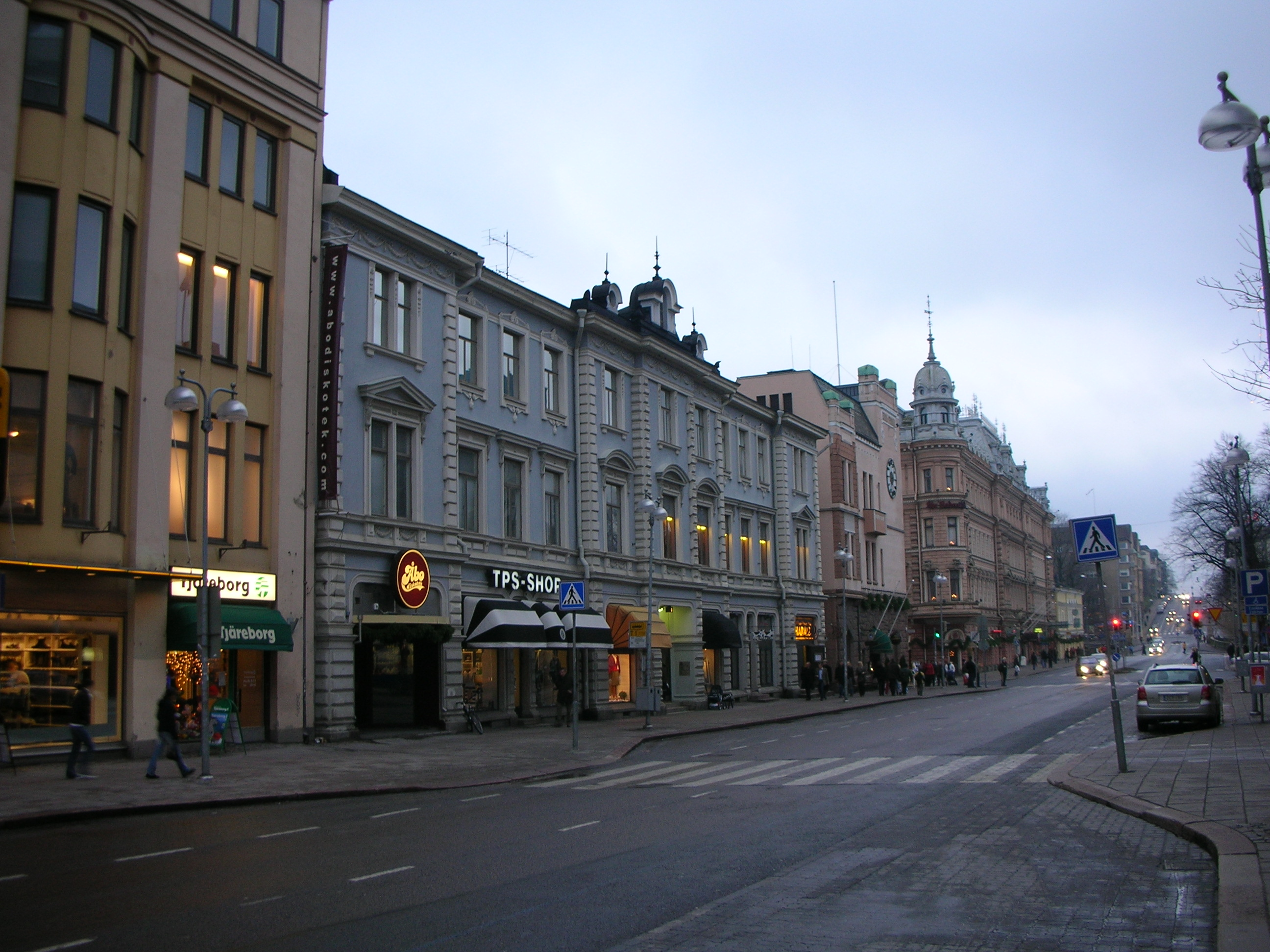 Aurakatu in Turku, Finland.